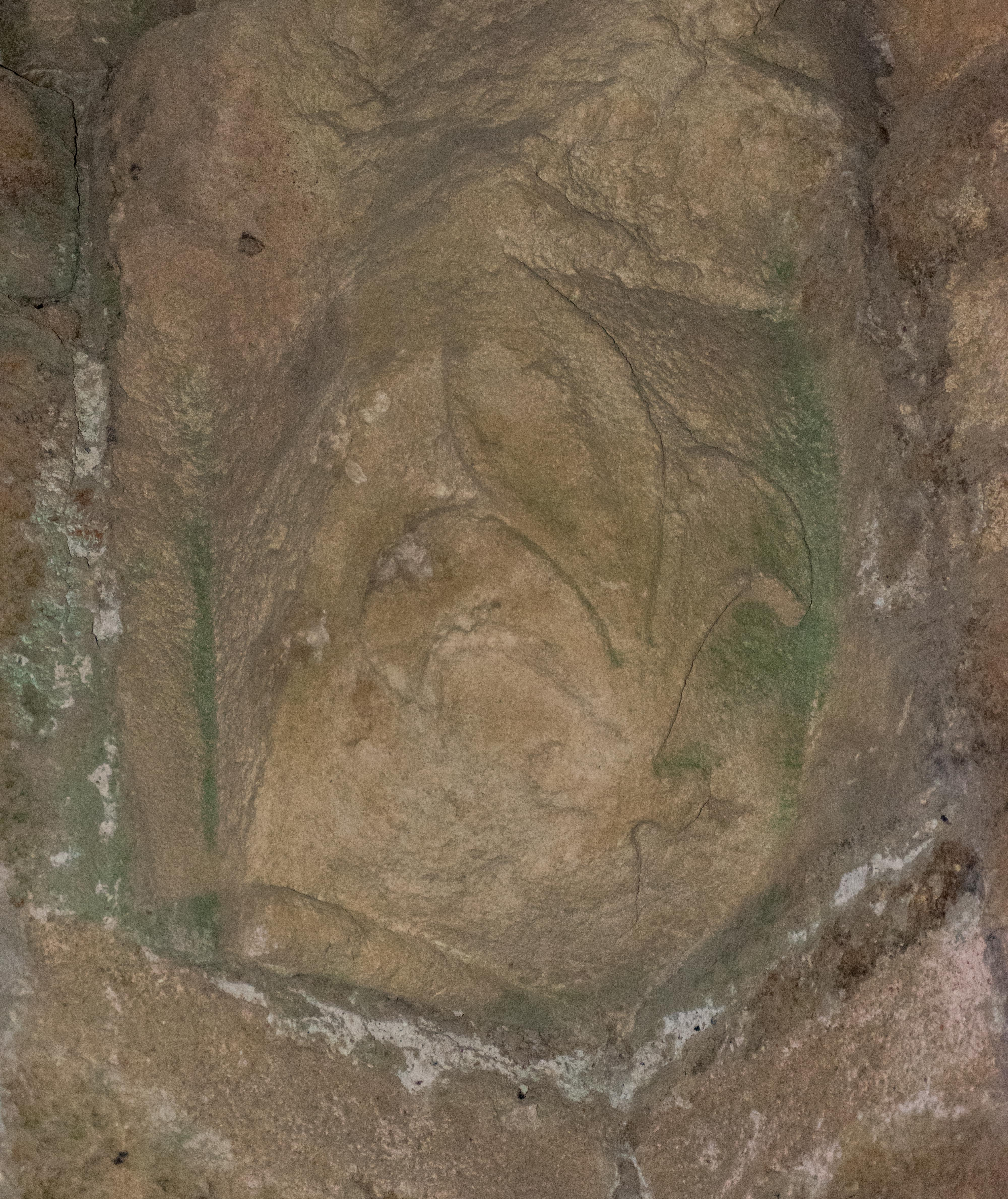 Acre